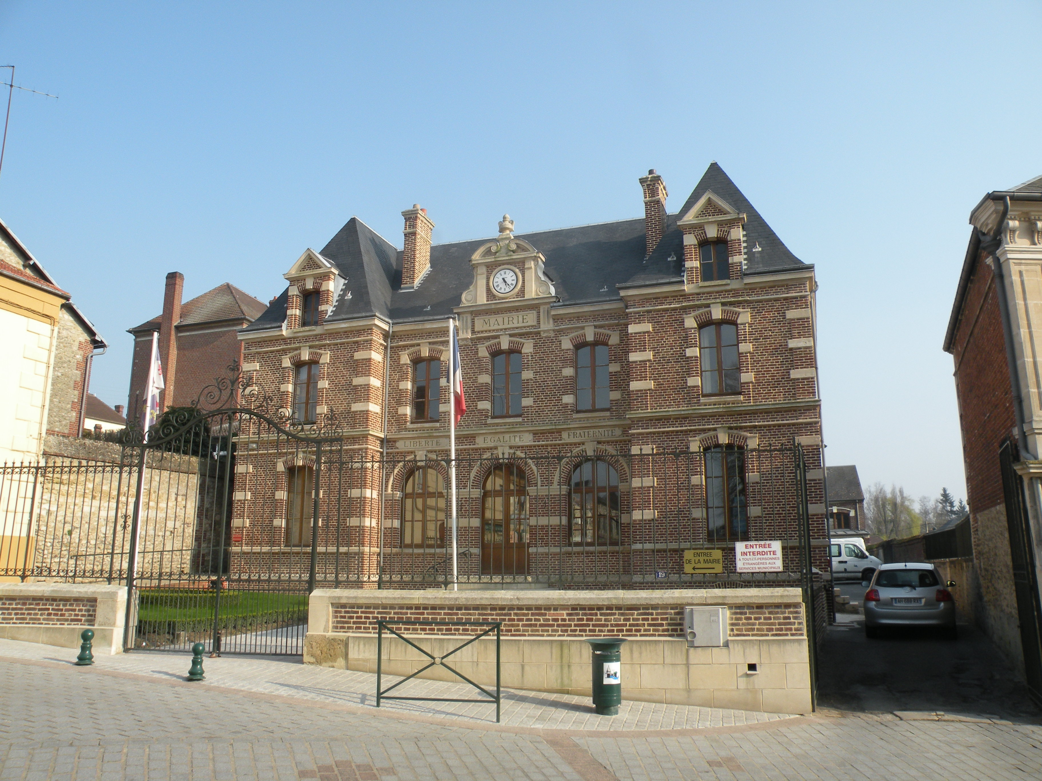 mairie de Hermes (Oise)